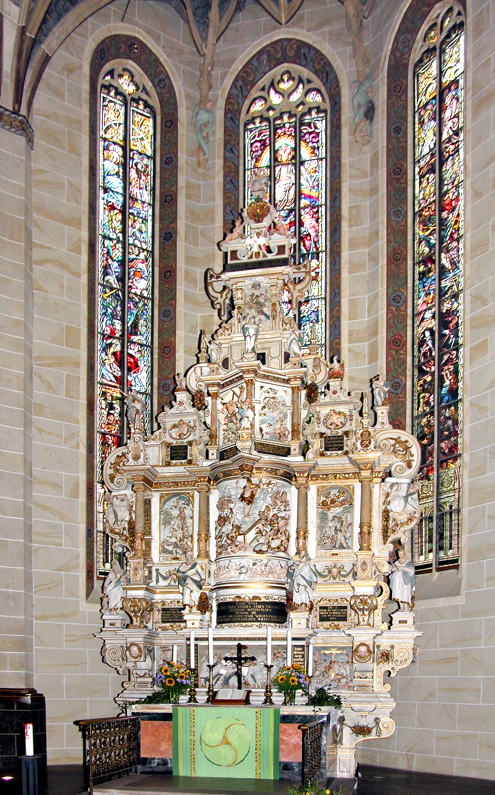 02.10.2008 01796 Pirna: Stadtkirche St. Marien, Kirchplatz (50.962419,13.943554). Heutiger Bau 1502-1546. Großes Altarwerk (in der Mitte Sintflut und Auferstehung, seitlich Jakobsleiter und Elias Himmelfahrt) 1611 von M. und D. Schwenke [DSCN34373.TIF]20081002030DR.JPG(c)Blobelt